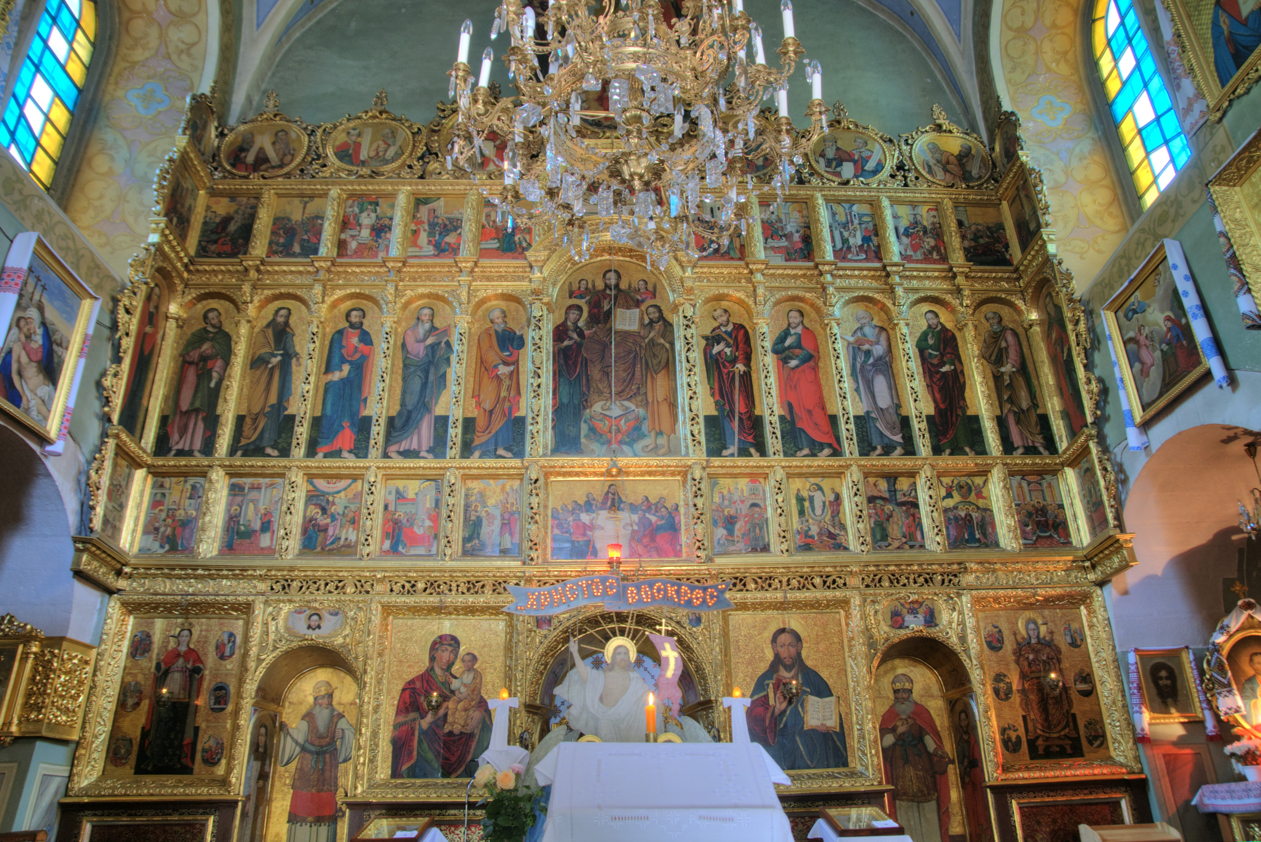 церква Параскеви, Львів, Хмельницького Б., 77